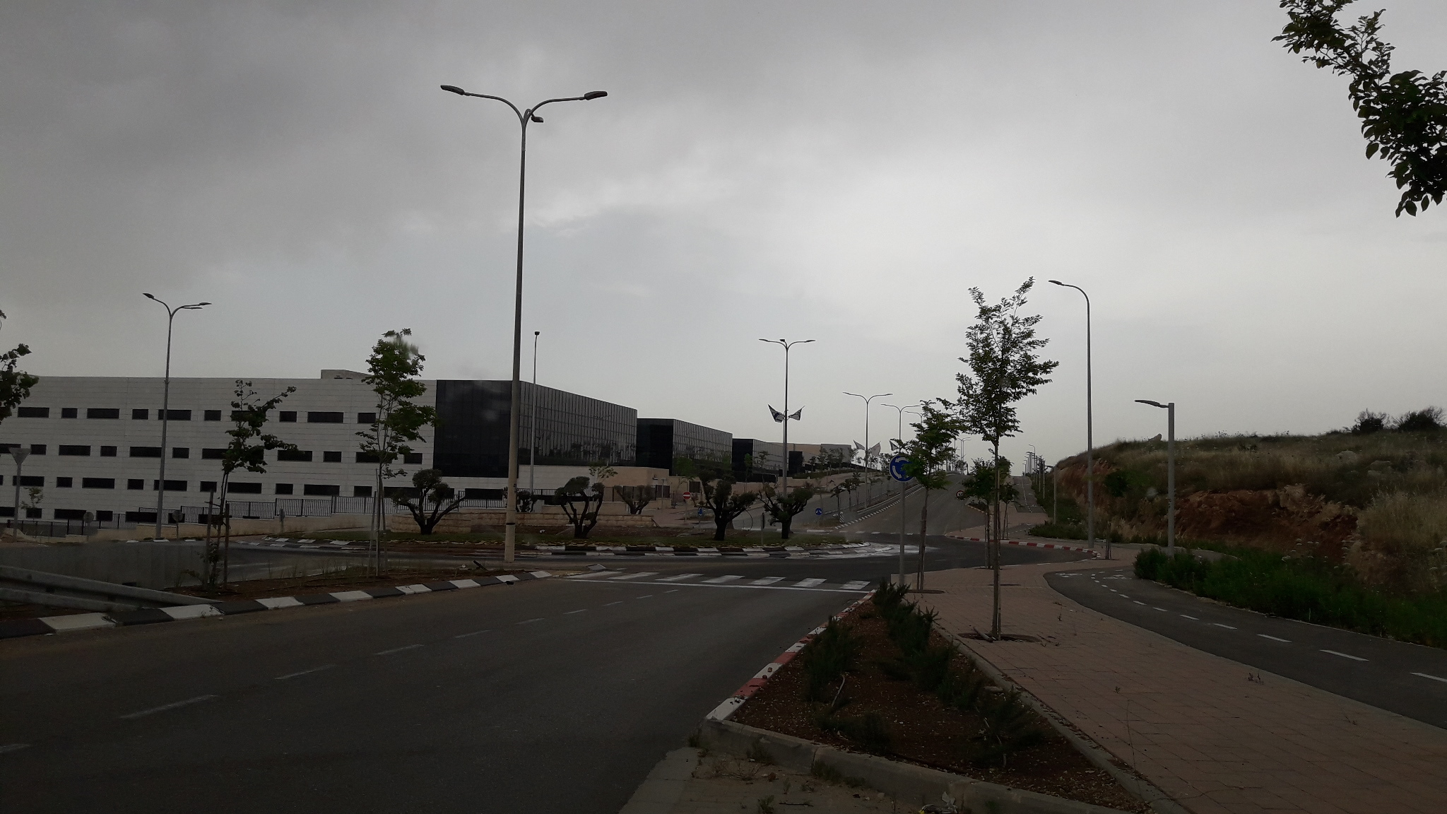 מרכז המיון הארצי החדש - מודיעין